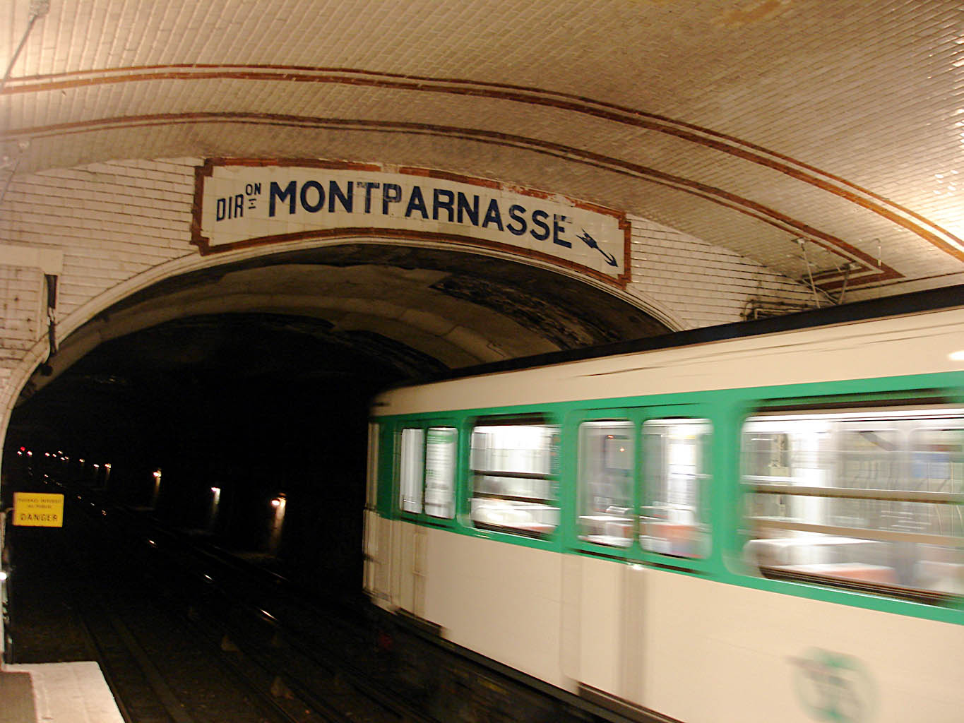 Station Solférino de la ligne 12 du métro de Paris, France.